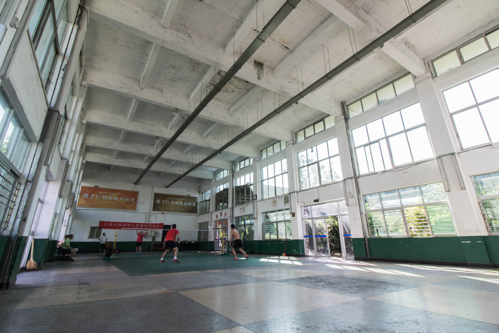 中文（中国大陆）: 废弃的沙县站站房，已经改造成社区活动中心